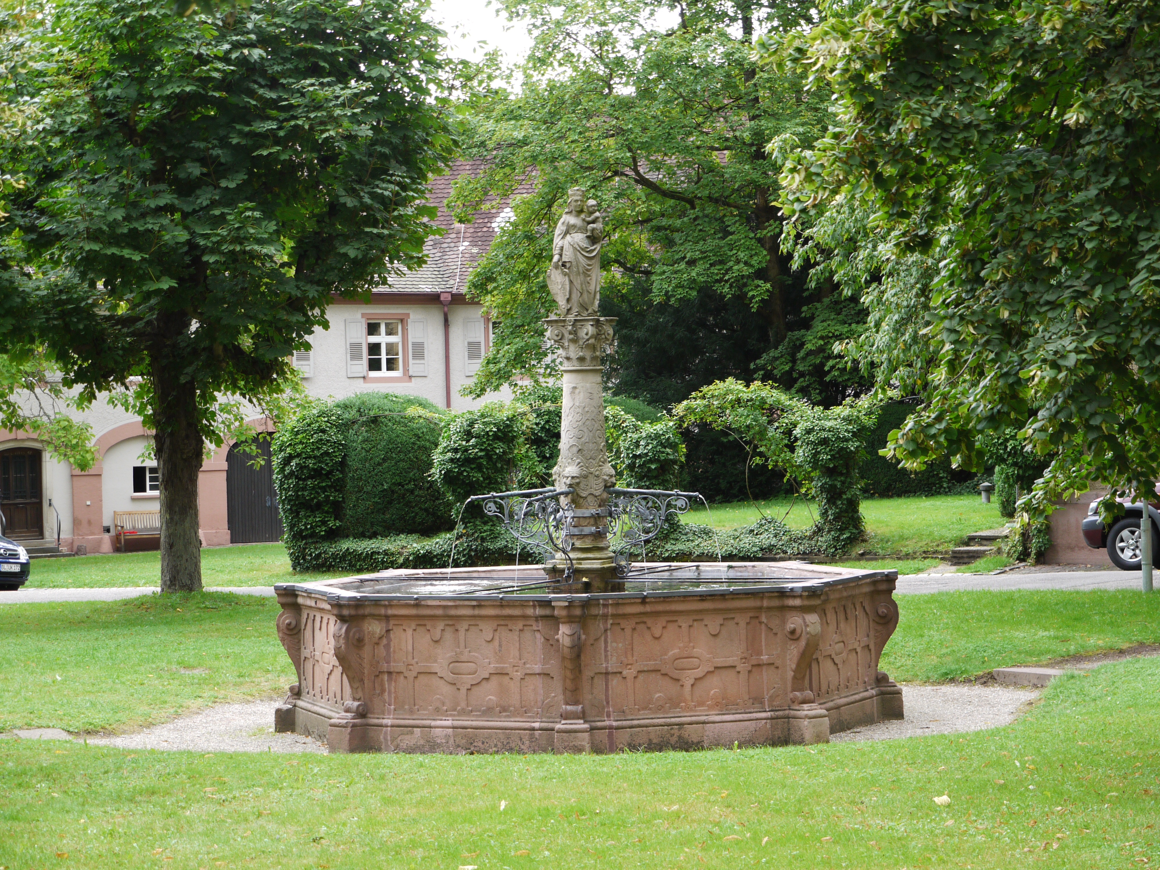 Brunnen Cistecienserinnenabtei Lichtenthal, Baden-Baden